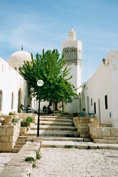 Zaouïa Sidi Bou Makhlouf (Le Kef, Tunisie) Photo de Stuart Edwards (2002)